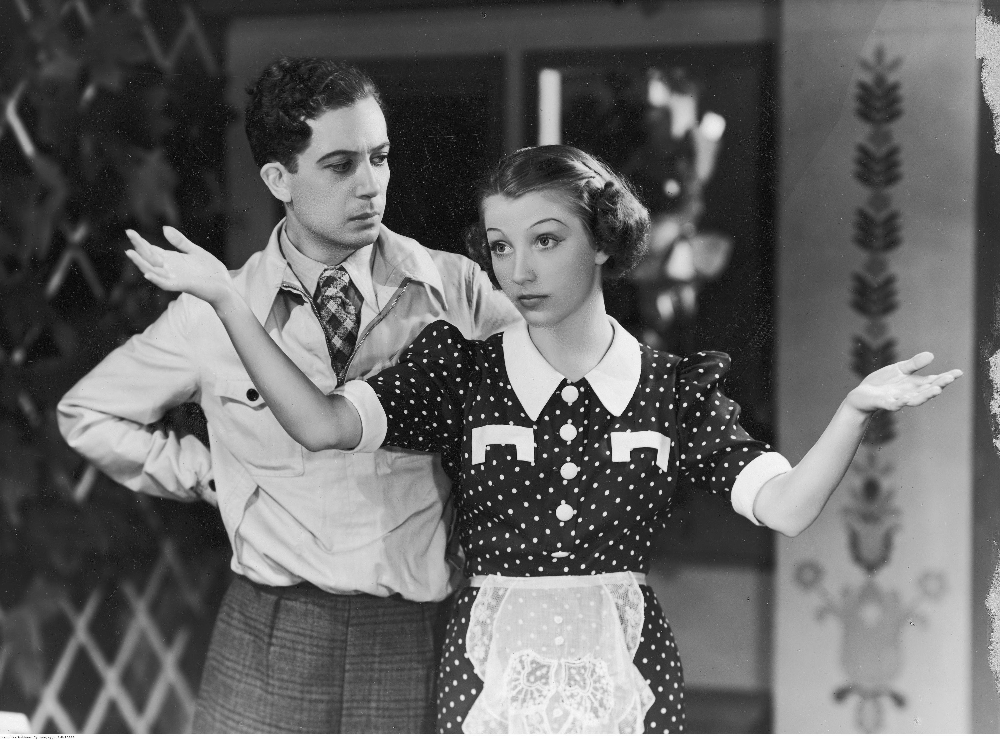 Lidia Wysocka i Jerzy Roland w przedstawieniu "Nowa Dalila" w Teatrze Małym w Warszawie